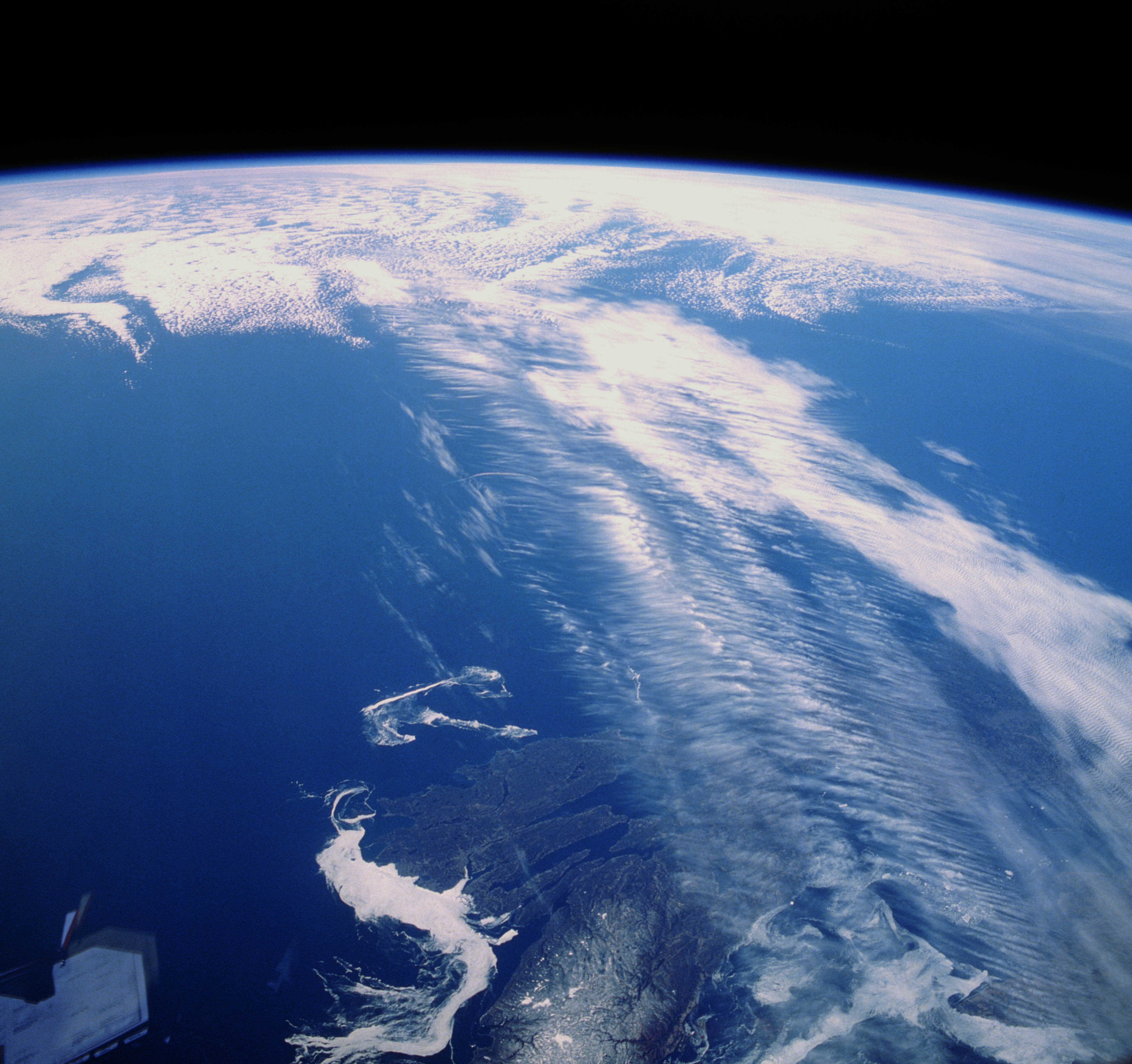 Straalstroom, vanaf Openbare bron